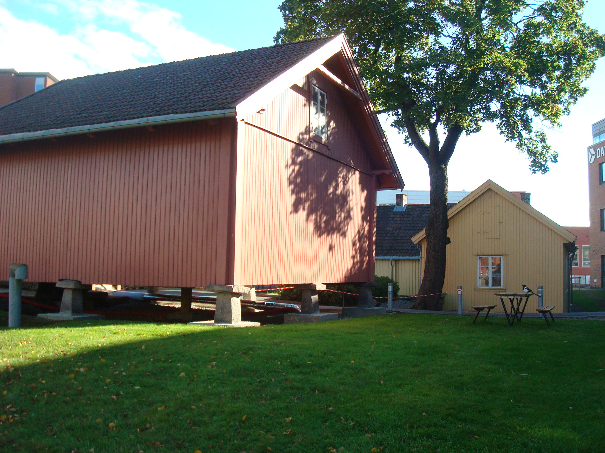 Grønvold gård. Grenseveien 95 i Oslo.